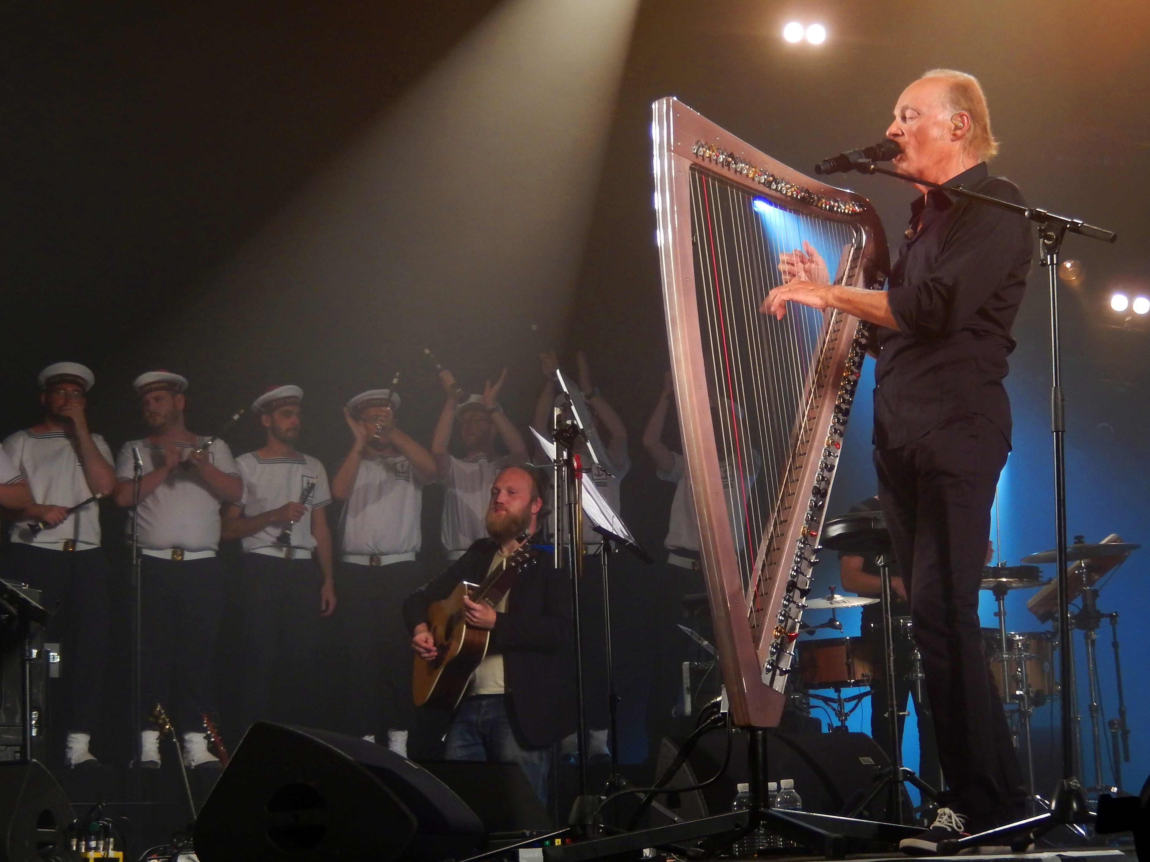 Concert d'Alan Stivell, accompagné du Bagad de Lann-Bihoué, à l'Espace Marine, lors du Festival interceltique de Lorient le 7 août 2016.